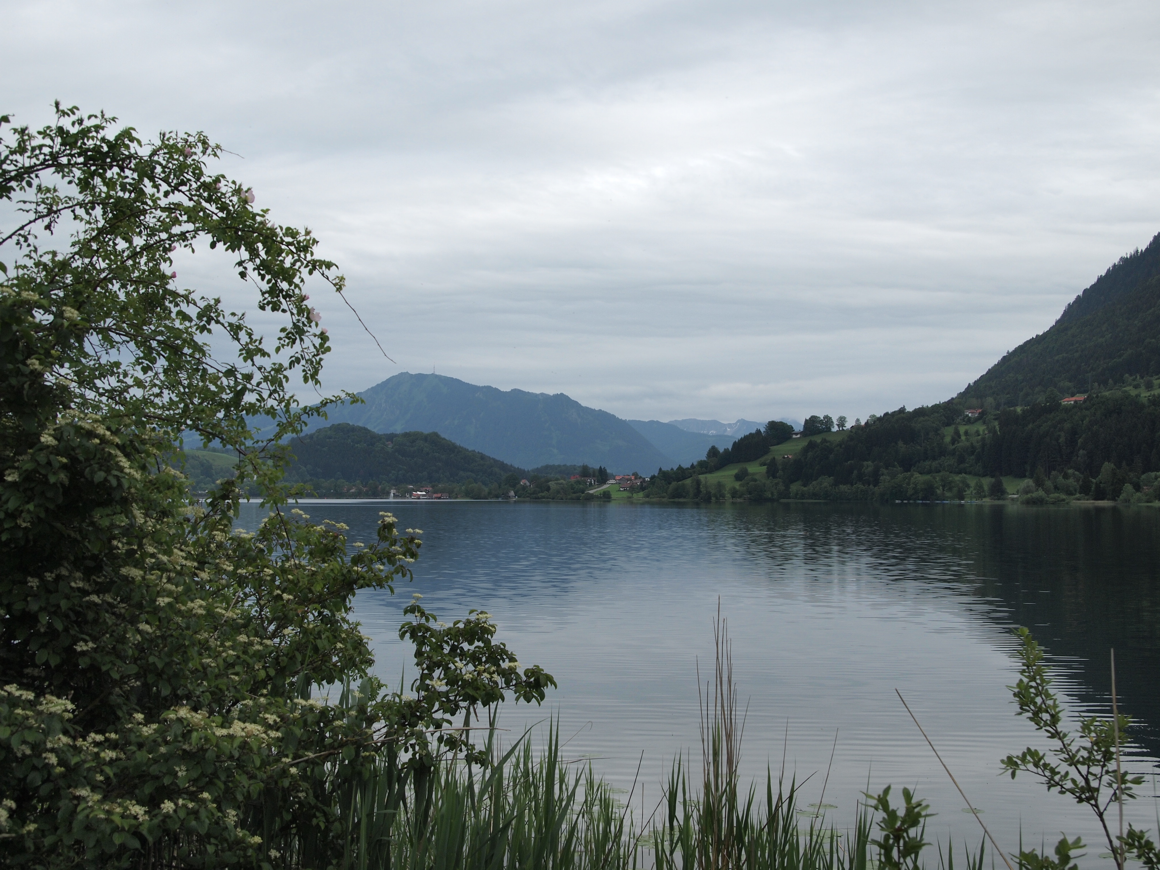 Großer Alpsee (Nahe Immenstadt/Allgäu), Nordufer, nahe Trieblings